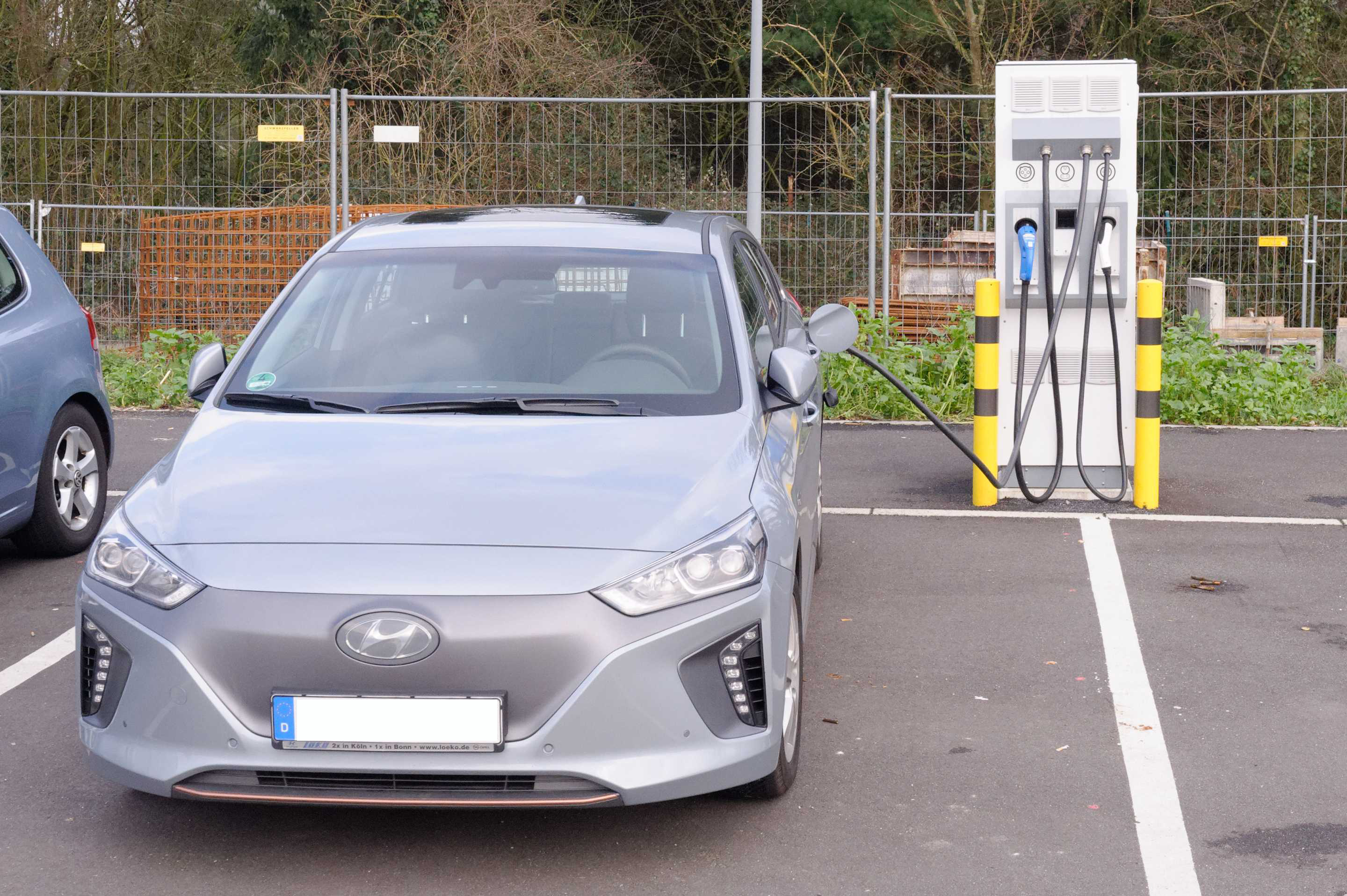 Hyundai Ioniq Elektro an einer Serways Ladestation in Hösel